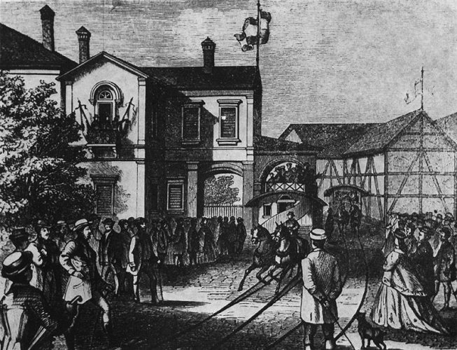 A pesti lóvasút megindulása, balra a lóvasúti állomásépület ("Bagolyvár" vagy "Vadászkastély") a mai napig megvan